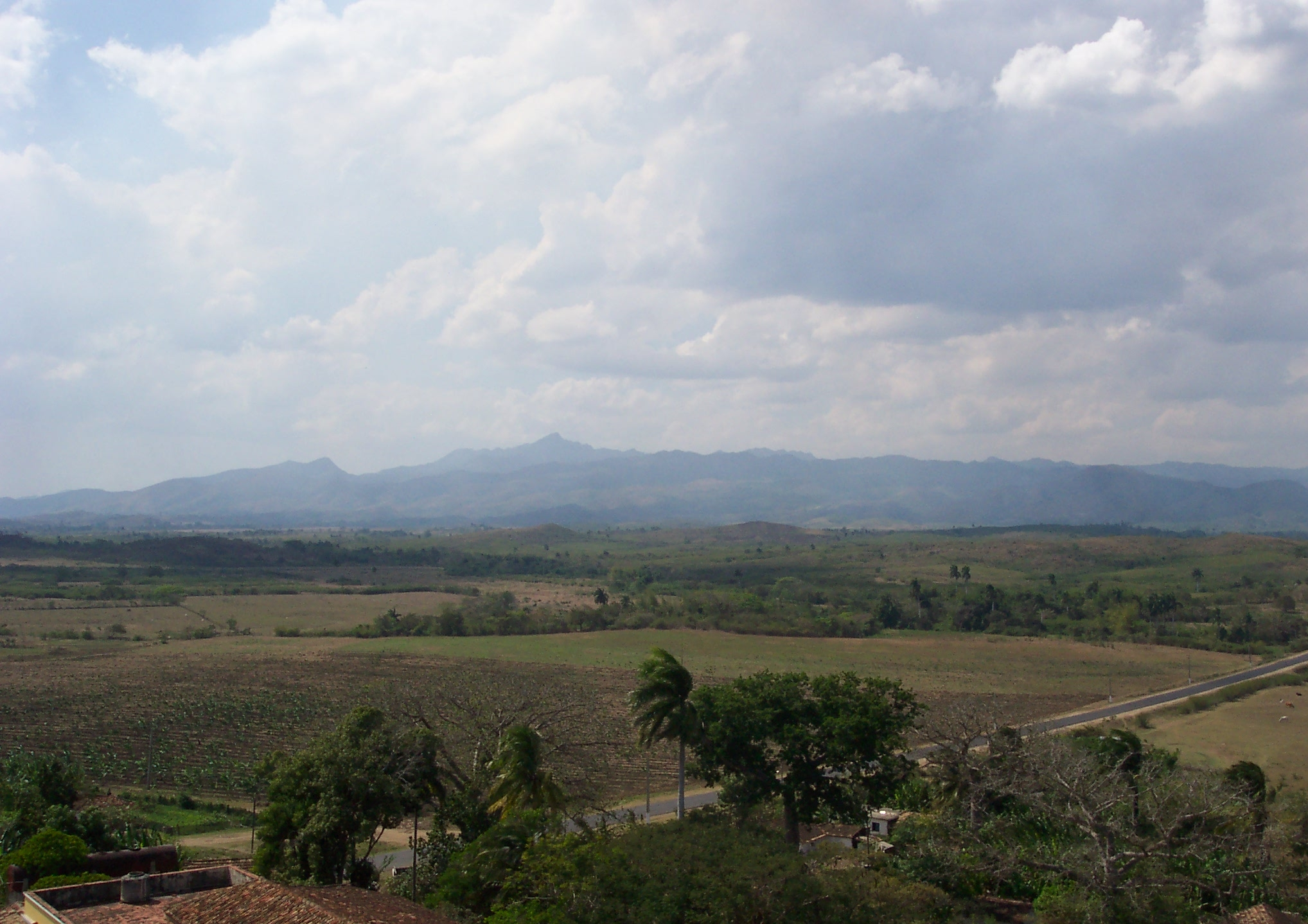 Valle de los Ingenios, Cuba